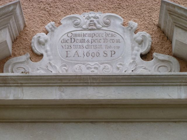 Schrift oberhalb des Eingangs zur Edmundsburg